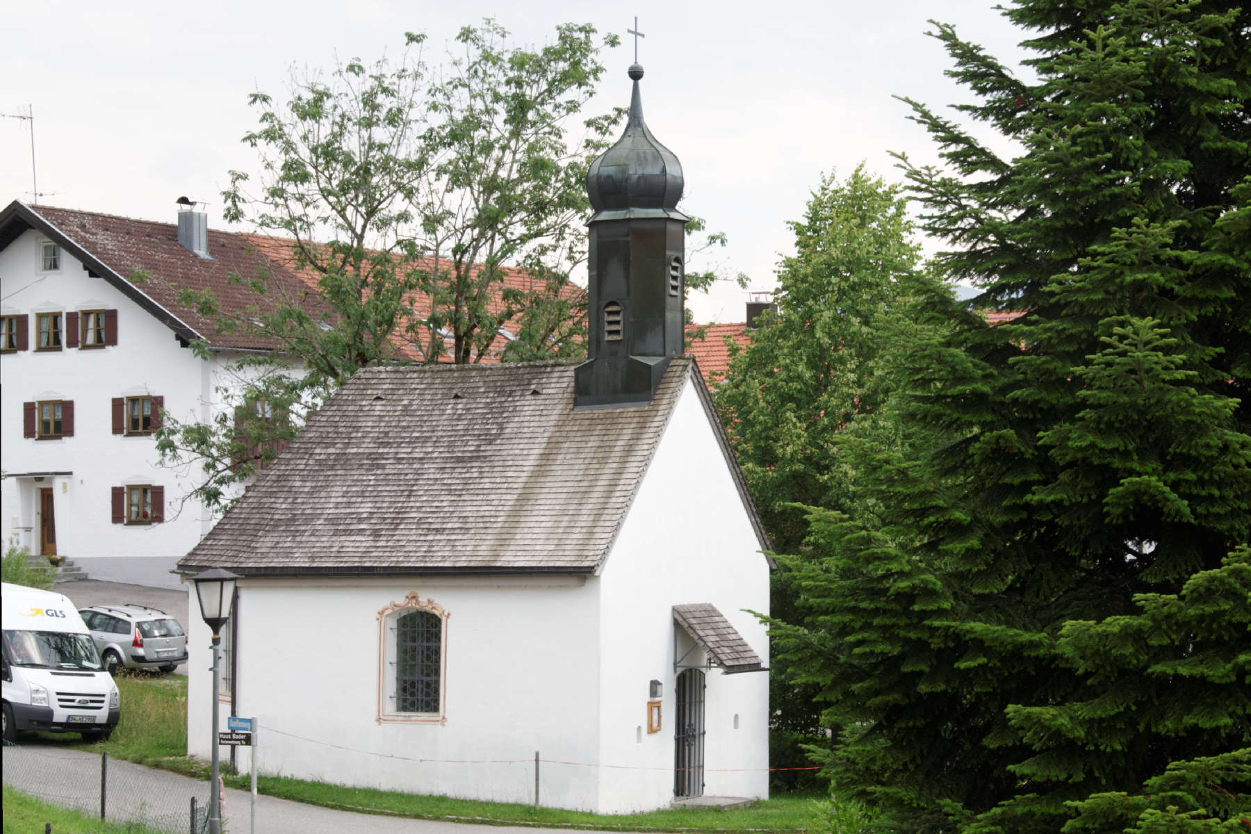 Saulgrub, Kapelle St. Josef im Ortsteil Wurmansau